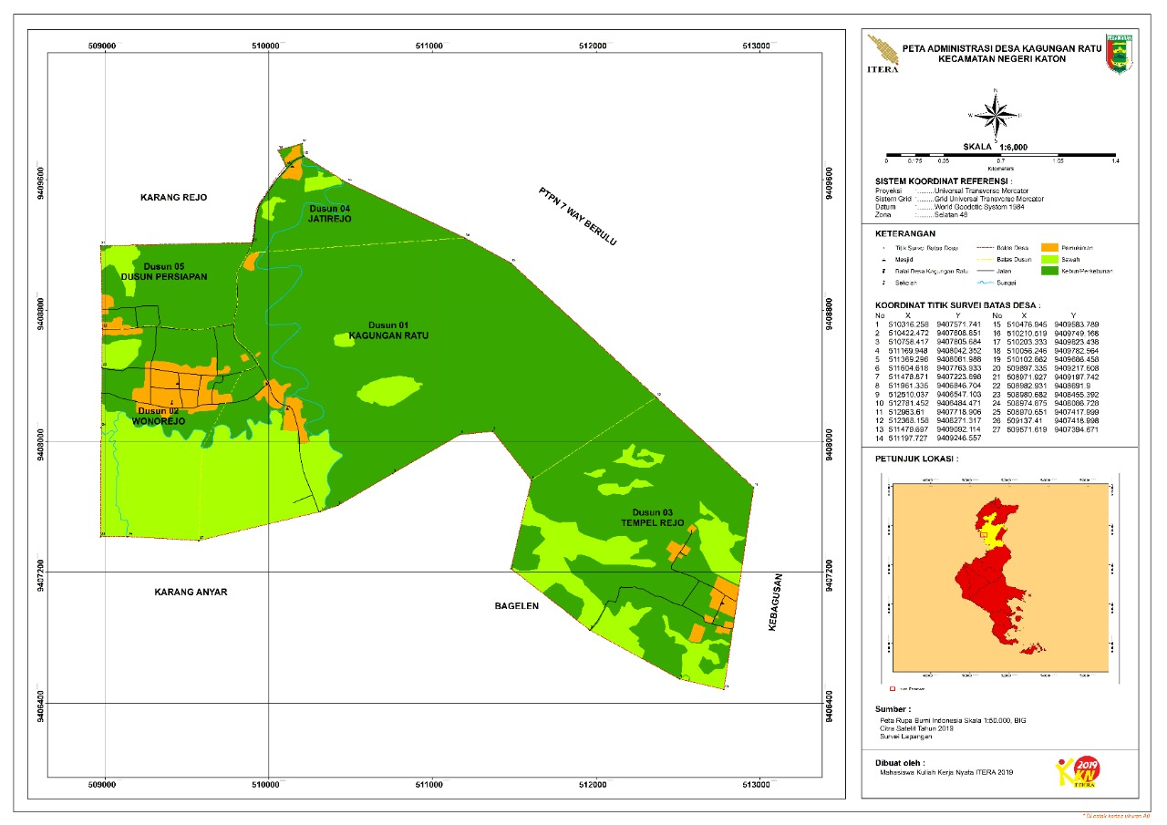 petadesa